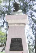 Fotografía del monumento a Jesus Garcia en la ciudad de Toluca, México